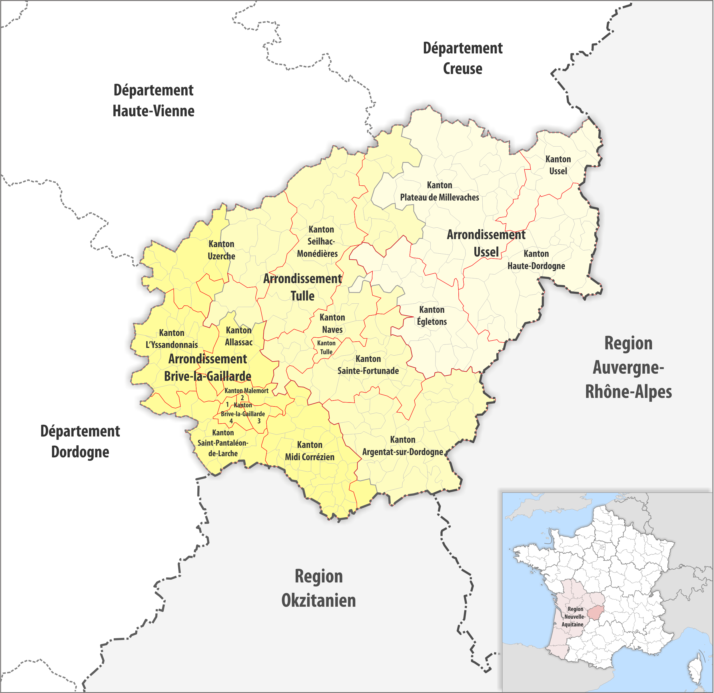 Gemeinden, Kantone und Arrondissemente im Departement Corrèze